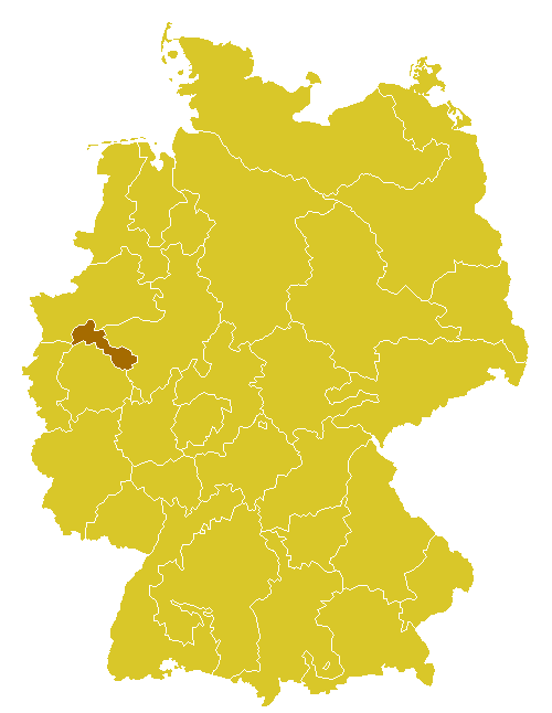 Beschreibung: Katholische Diözese/Bistum in Deutschland, Catholic Dioecese in Germany, Essen